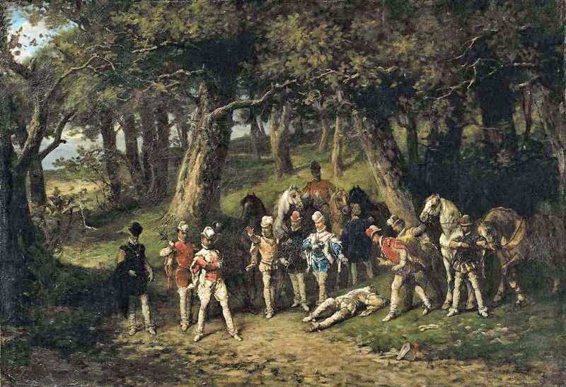 Бакалович В. "Дуель міньйонів", остання чверть ХІХ ст.